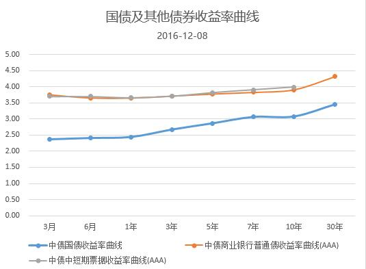 中文（中国大陆）: 2016年12月8日的中国人民银行国债及其他债券收益率曲线